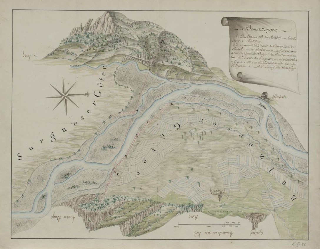 Plan des Rheinverlaufs bei Trübbach (Gemeinde Wartau) und Balzers, entstanden aus Anlass eines wuhr- und Grenzstreits zwischen Liechtenstein und der Schweiz.